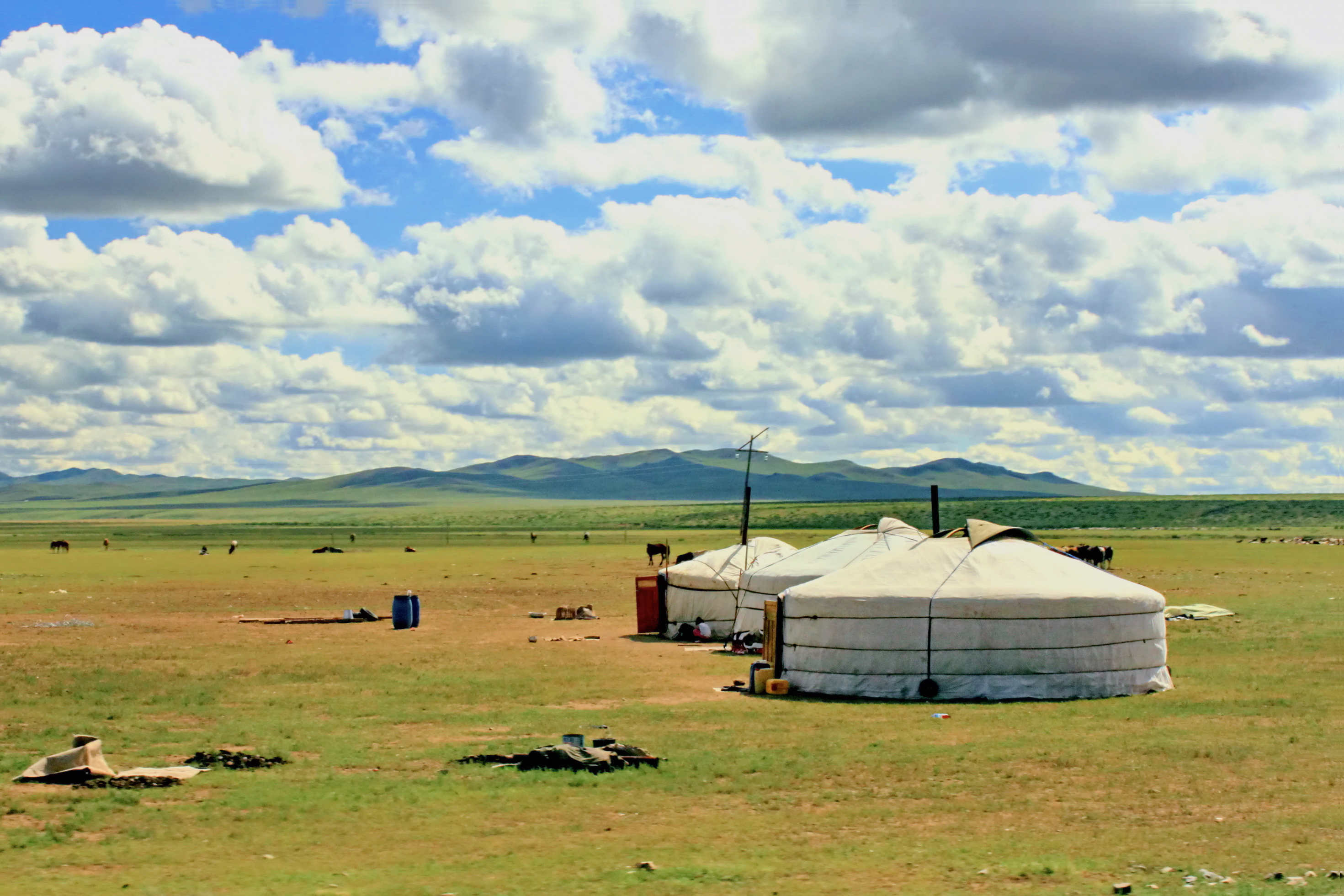 Jurty na stepie pomiędzy Ułan Bator a Karakorum. Mongolia.